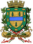 Armoiries de la ville de Gatineau